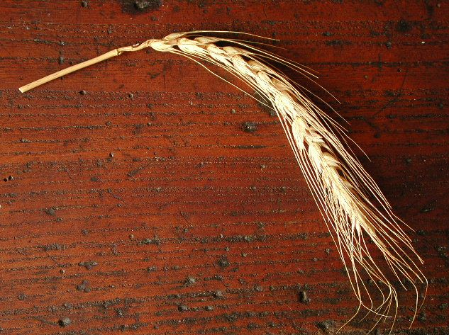 Spiga di frumento tenero "Rieti", cultivar da cui il genetista italiano Nazareno Strampelli derivò gran parte dei suoi ibridi